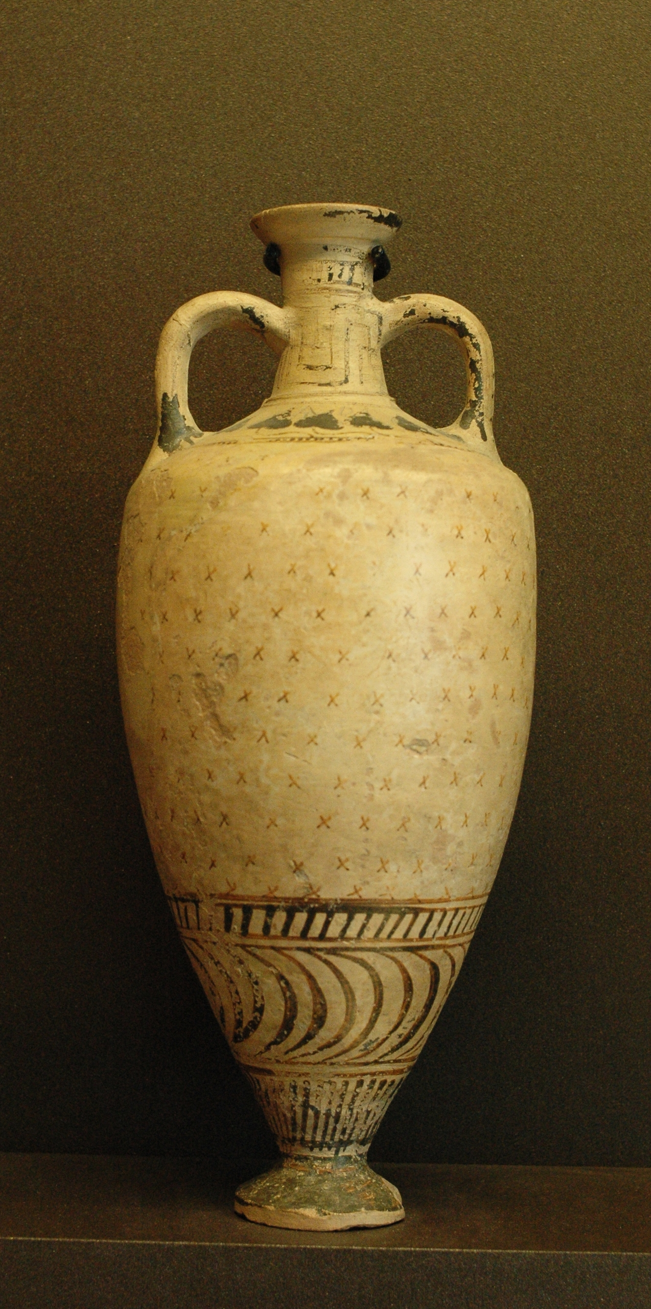 Fikellura amphoriskos from Kameiros, Rhodes, ca. 550 BC–525 BC.